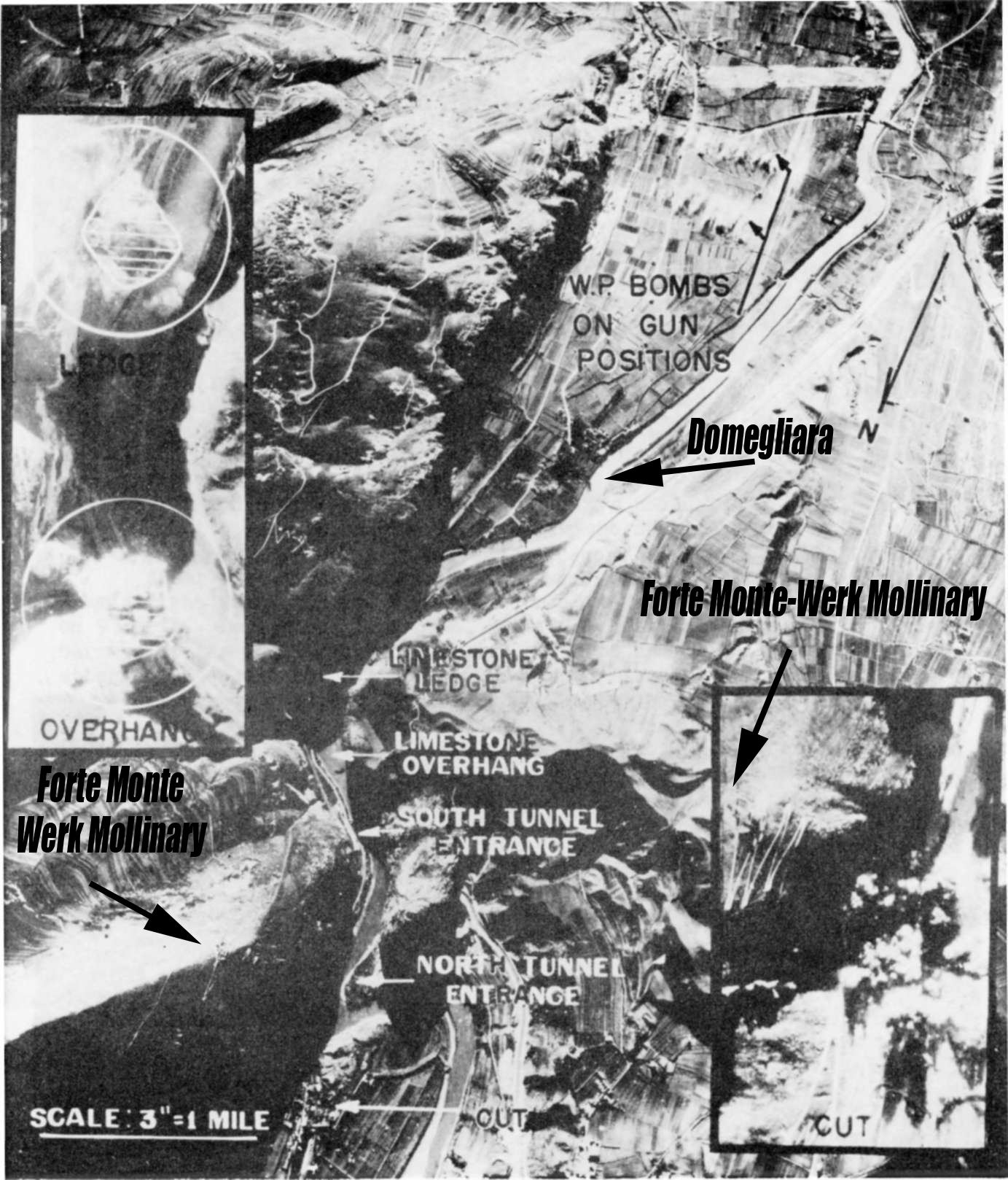 Battle-of-the-brenner-bomb-wing-group-us-air-force-world-war